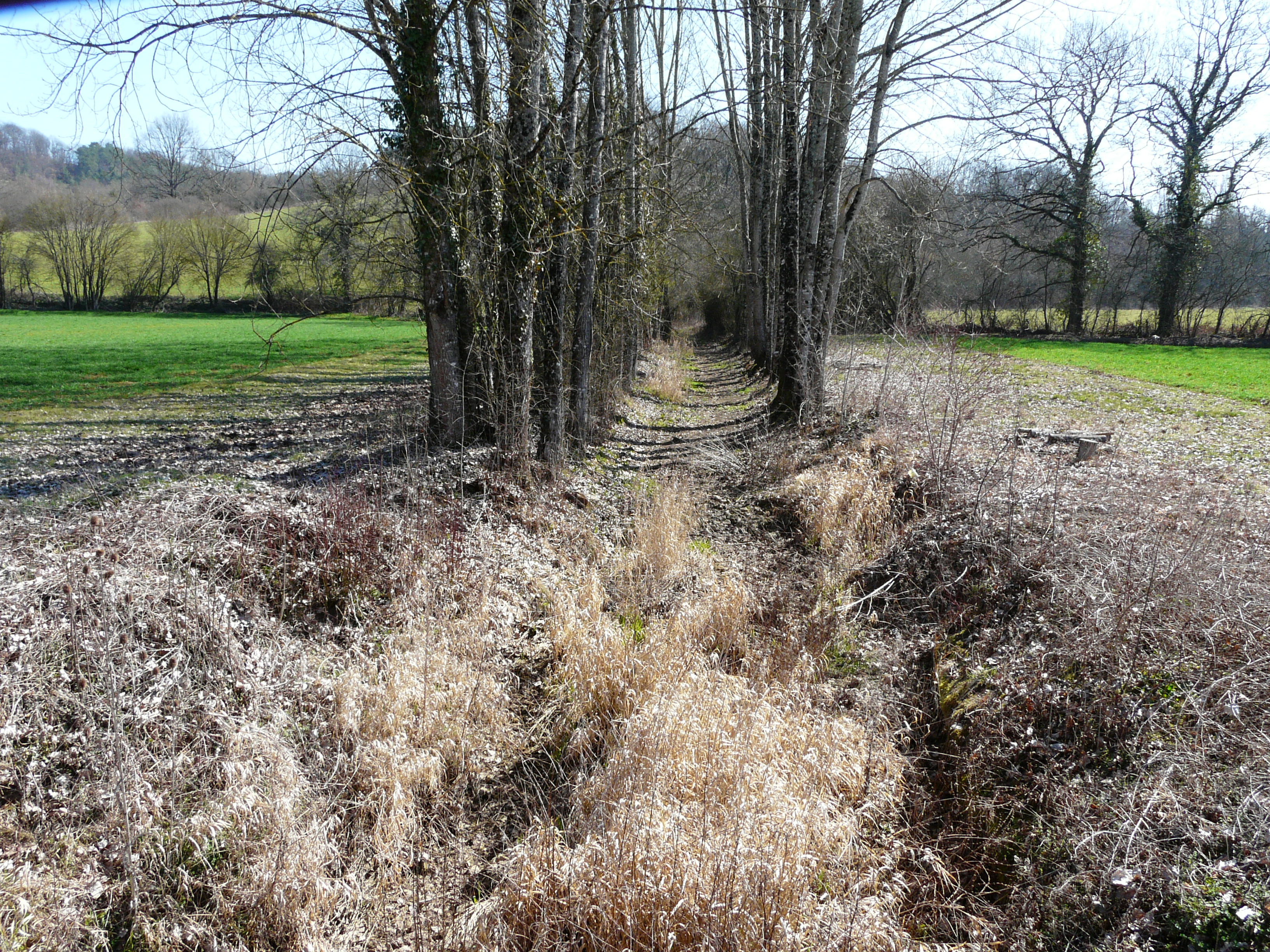 Le lit à sec du Vern au sud de la Combe, Vergt, Dordogne, France. Vue prise en direction de l'amont.